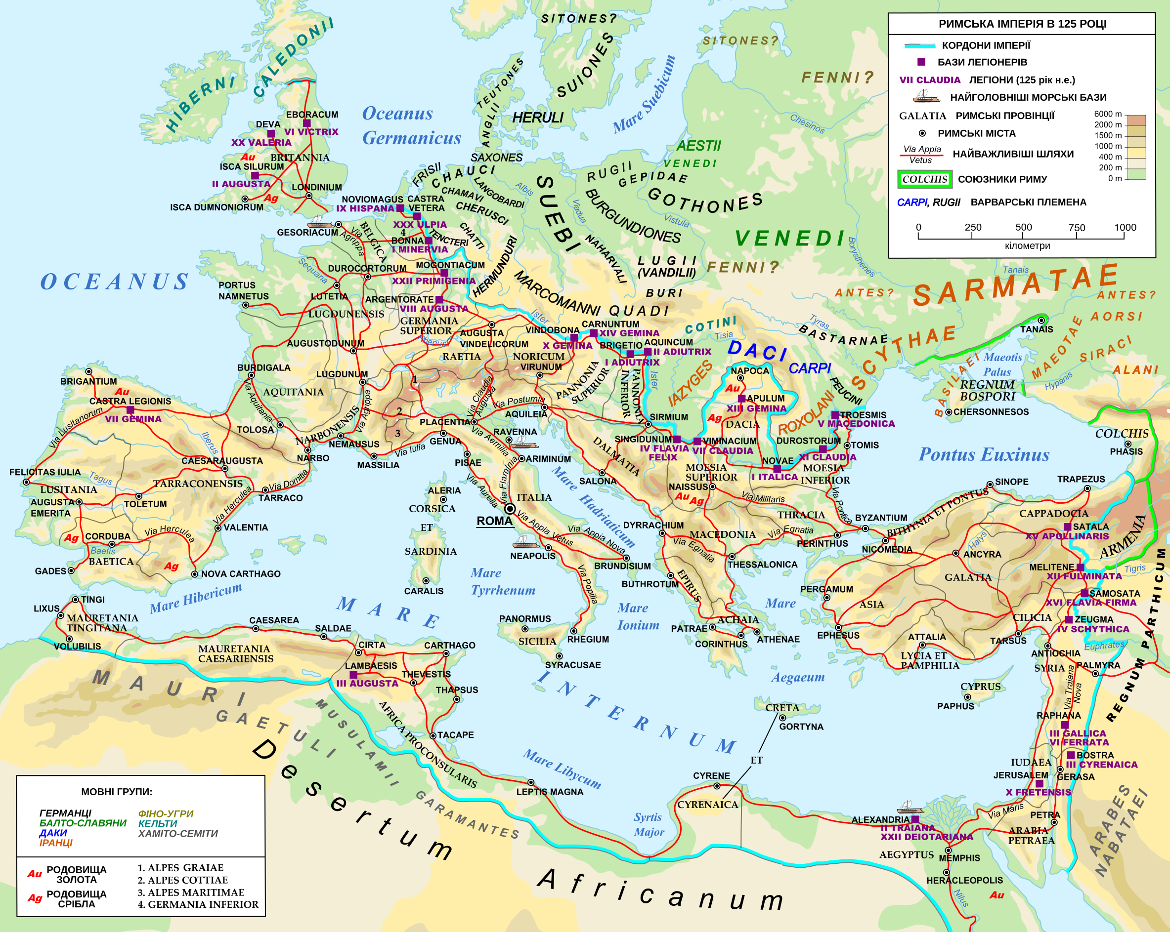 Мапа Римської Імперії 125 р.